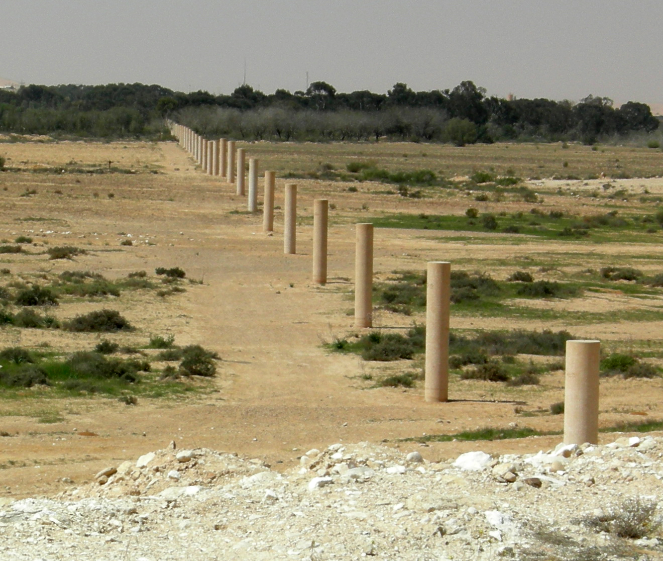 Sculpture